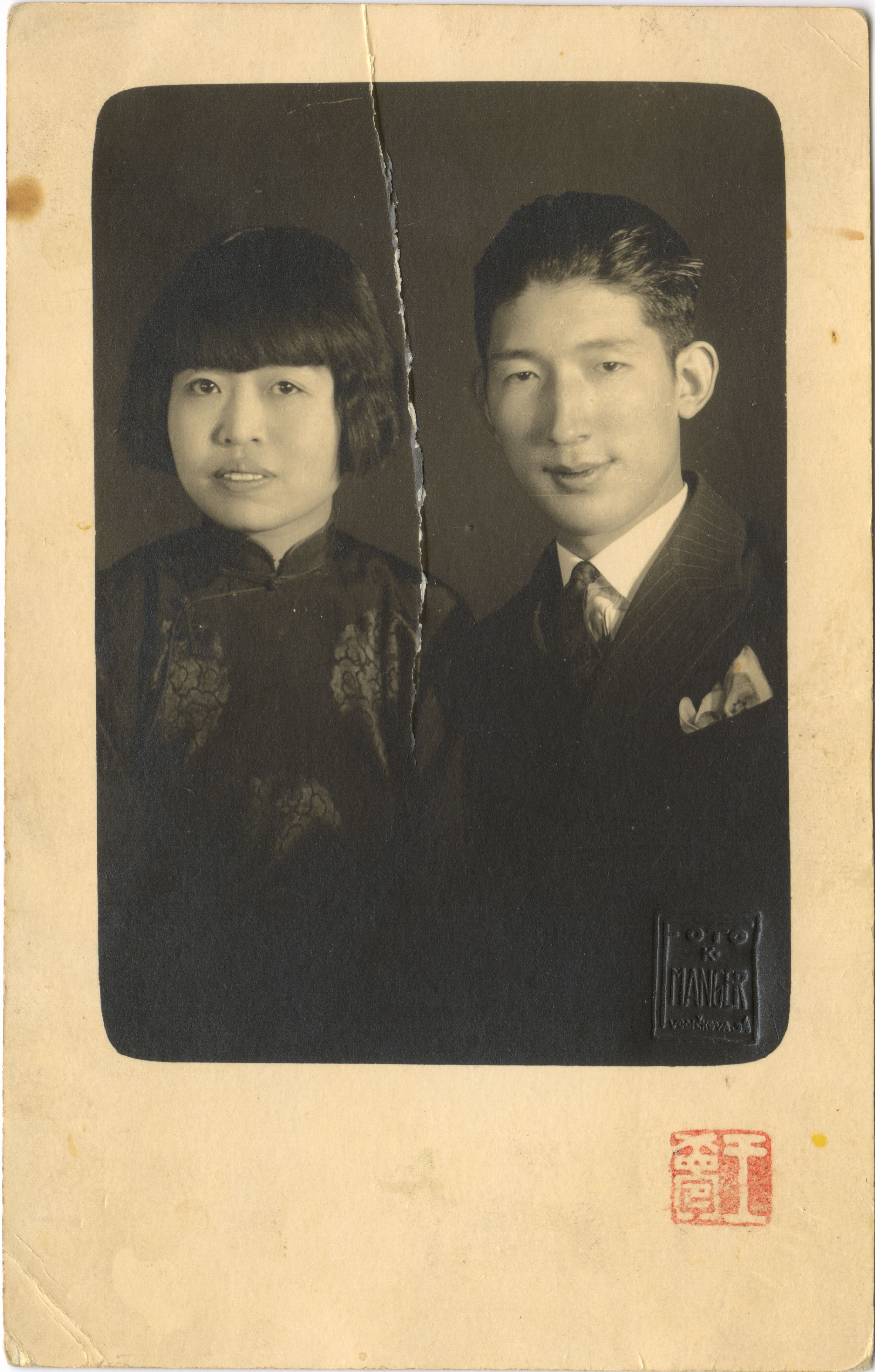 Portrait of Wang Meng and Sun Kewu